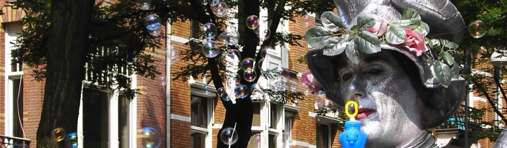 Ik heb deze foto zelf gemaakt in Amsterdam, vlak voor het Rijksmuseum.